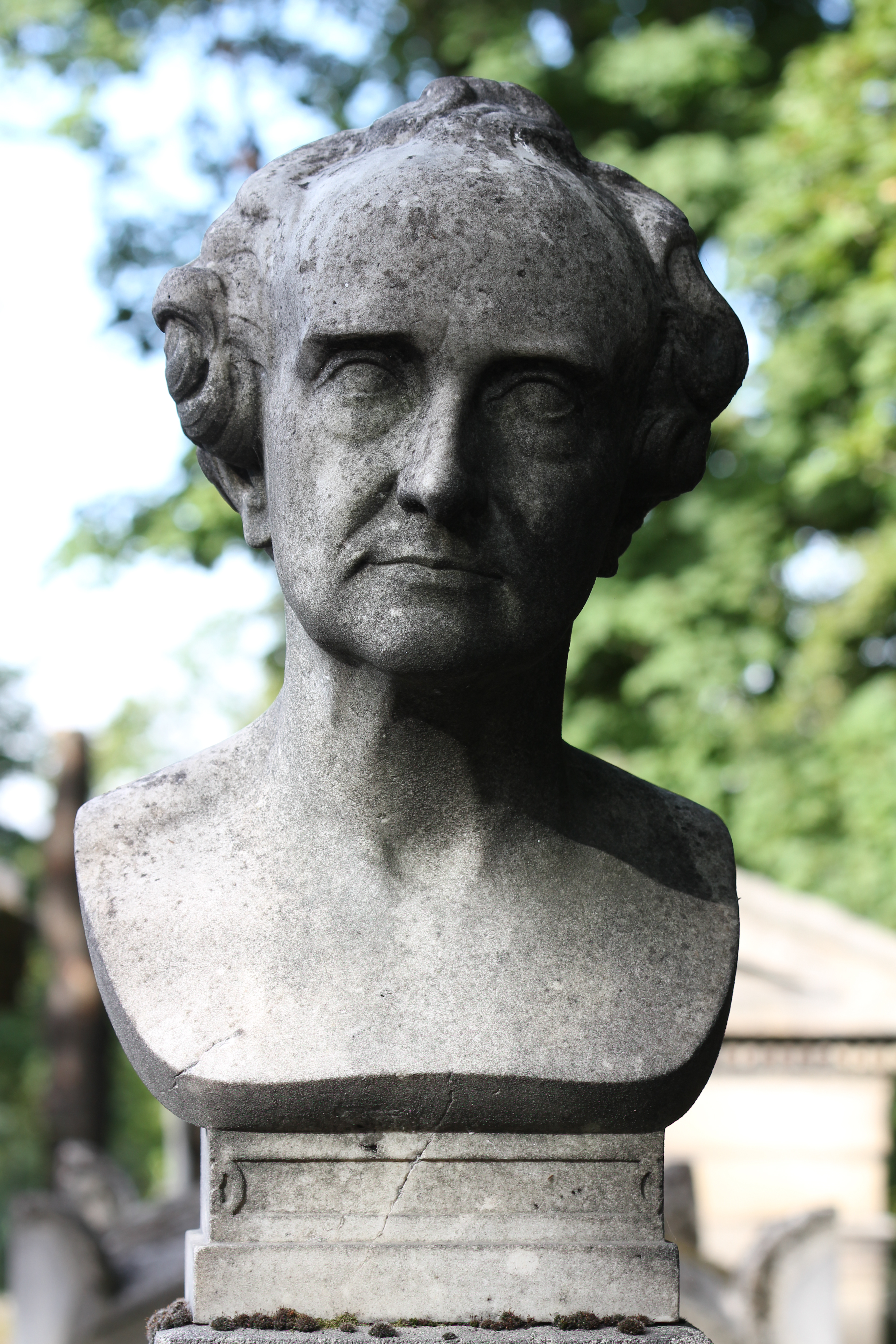 Sépulture de François Hippolyte Walferdin (1795-1880), physicien, député et collectionneur d'art. Stèle surmontée d'un buste.